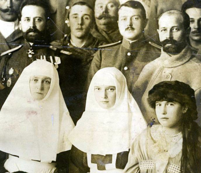 1916年。アレクサンドラ皇后と彼女の娘のタチアナ、アナスタシア。タチアナの後ろにいるのがマリアの恋愛相手ニコライ・デメンコフ